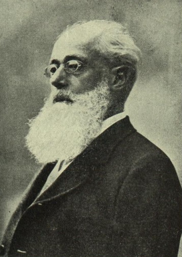 Mariano Demaría. Nuevo ministro plenipotenciario de la Argentina en España. Fotografía de Christian Franzen